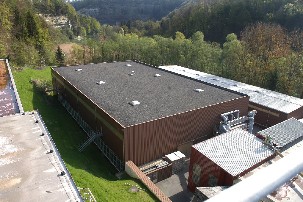 Pavatex Werk in Friboug, Schweiz